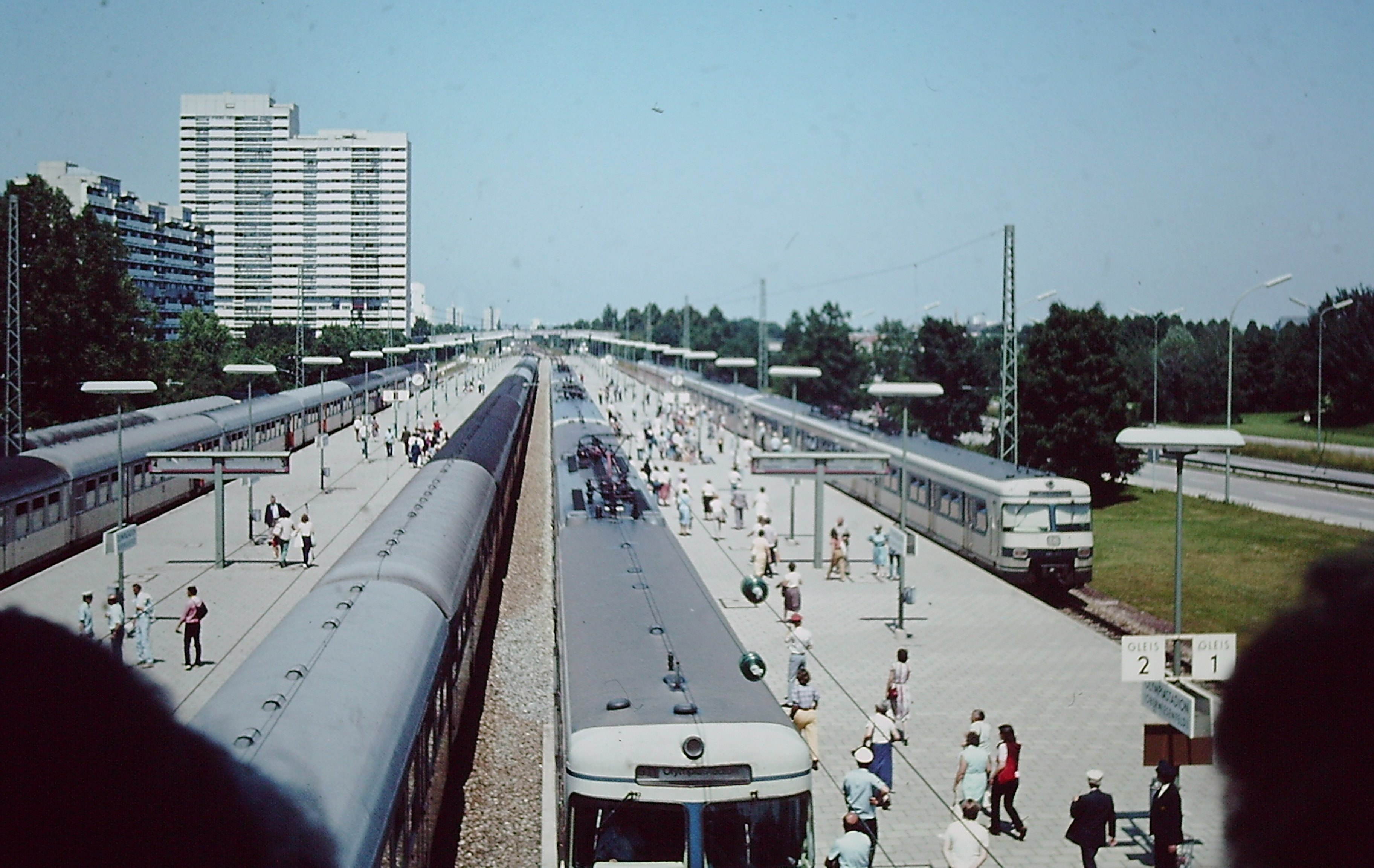 Rückreise vom Abschlussgottesdienst des Katholikentags am 8. Juli 1984 im Bahnhof München Olympiastadion